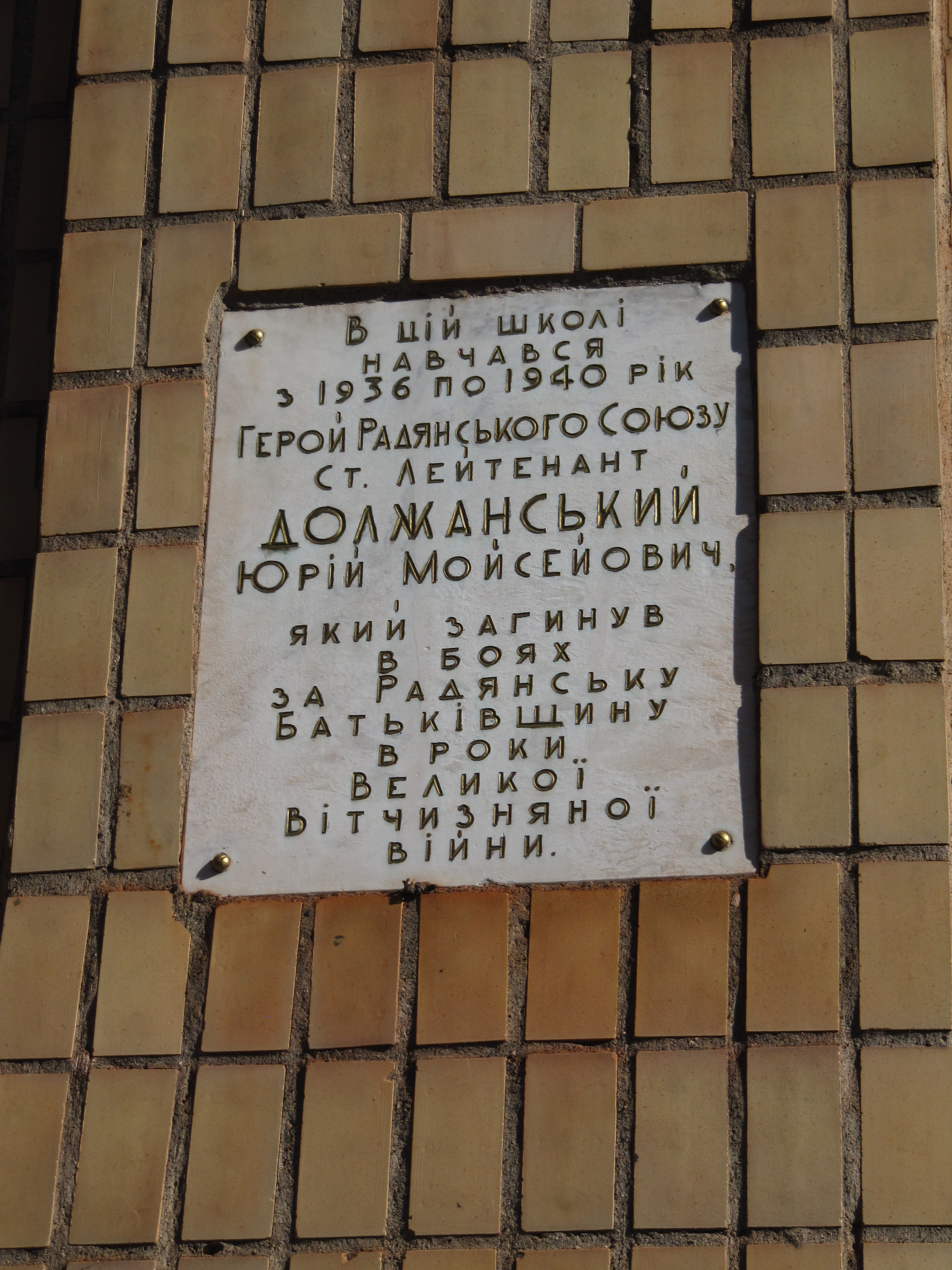 Приміщення, в якому навчався Герой Радянського Союзу Ю. Должанський, Кривий Ріг, проспект Карла Маркса, 84, раніше школа №21, нині "Міжшкільне навчально-виробниче об'єднання"